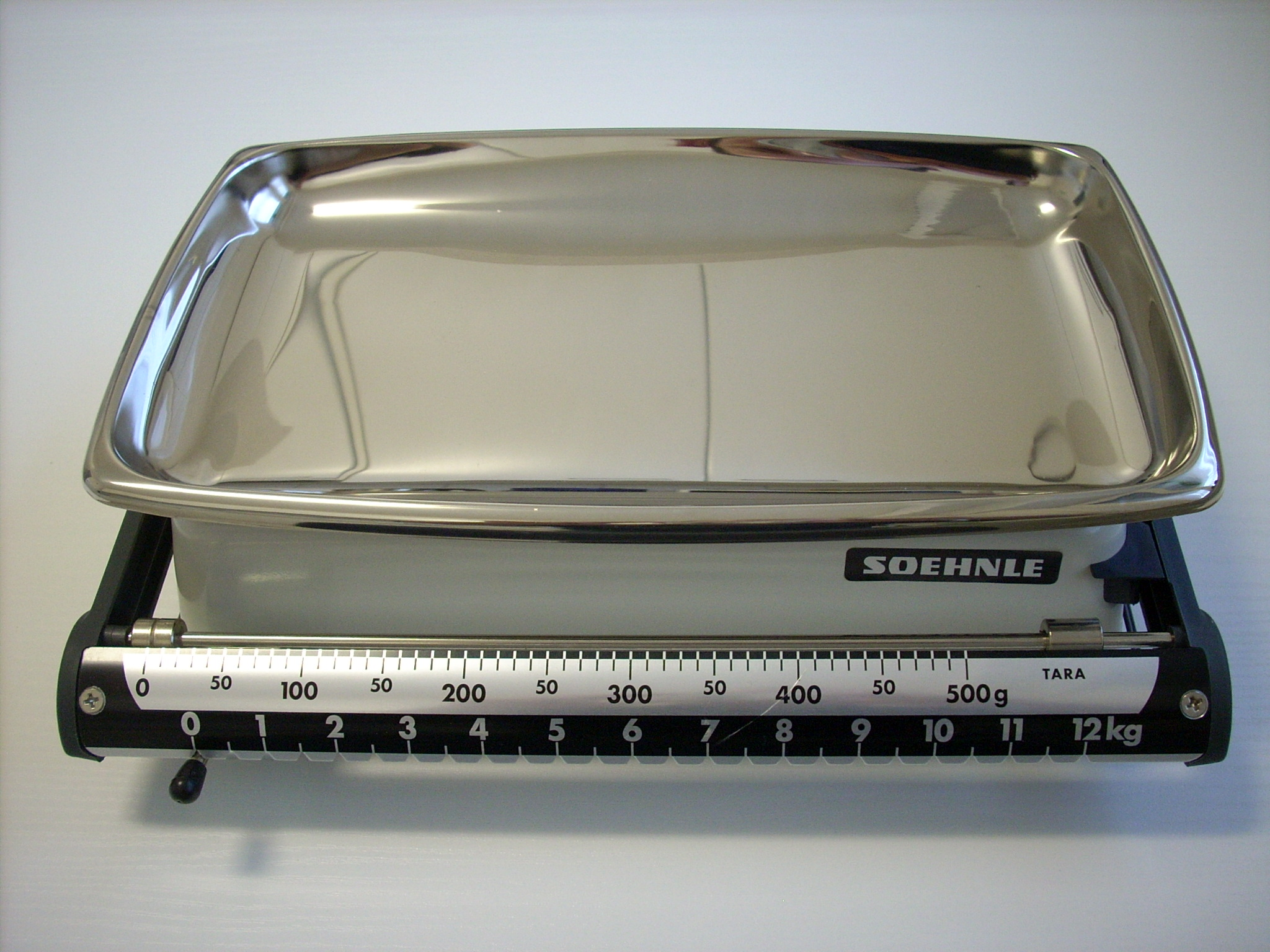 Soehnle-Laufgewichts-Balkenwaage, Alter unbekannt (vermutlich 1980er Jahre). Wägebereich 0 - 12 kg, Teilung 10 g.